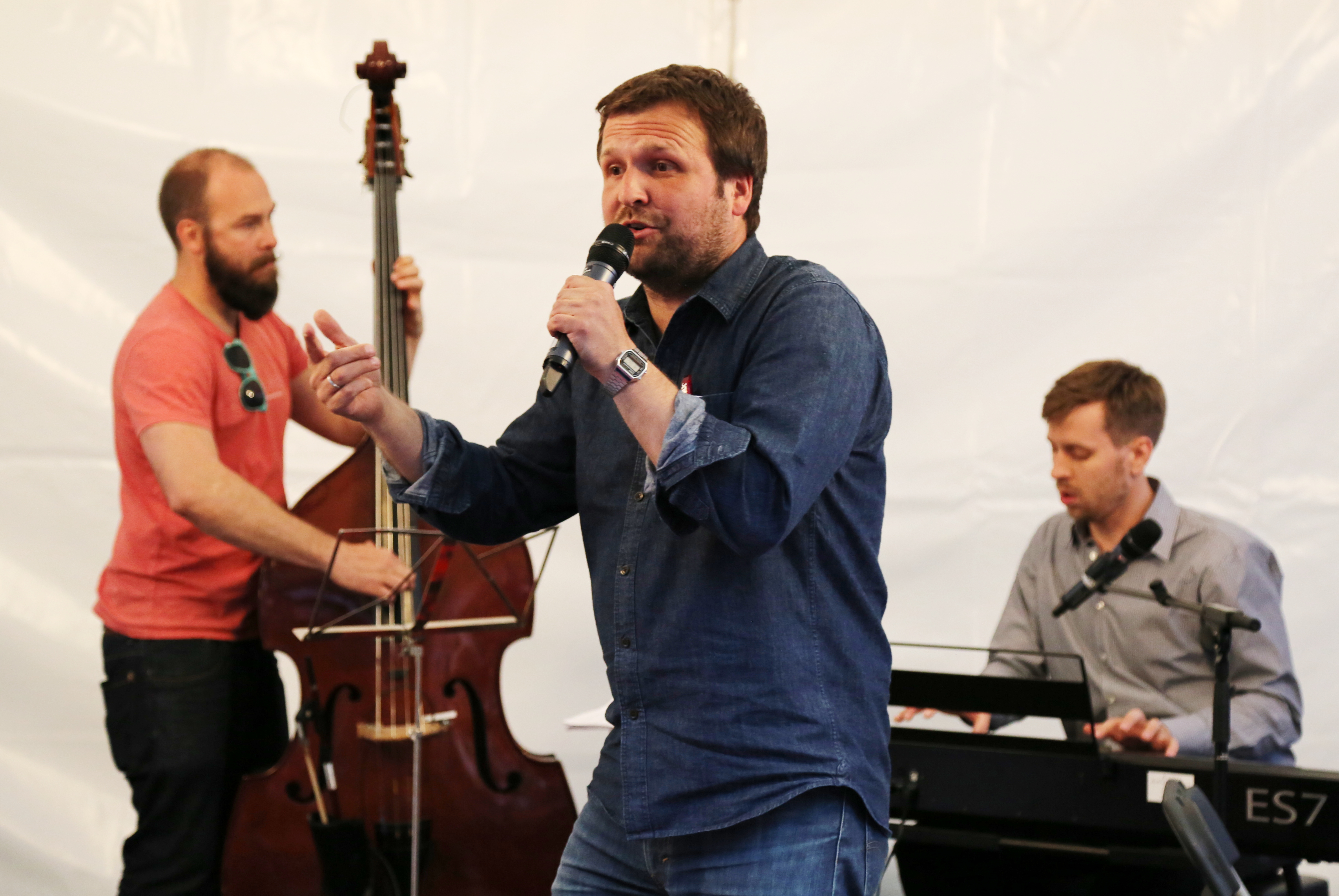 Bumillo - Christian Bumeder auf dem Corso Leopold, Mai 2017